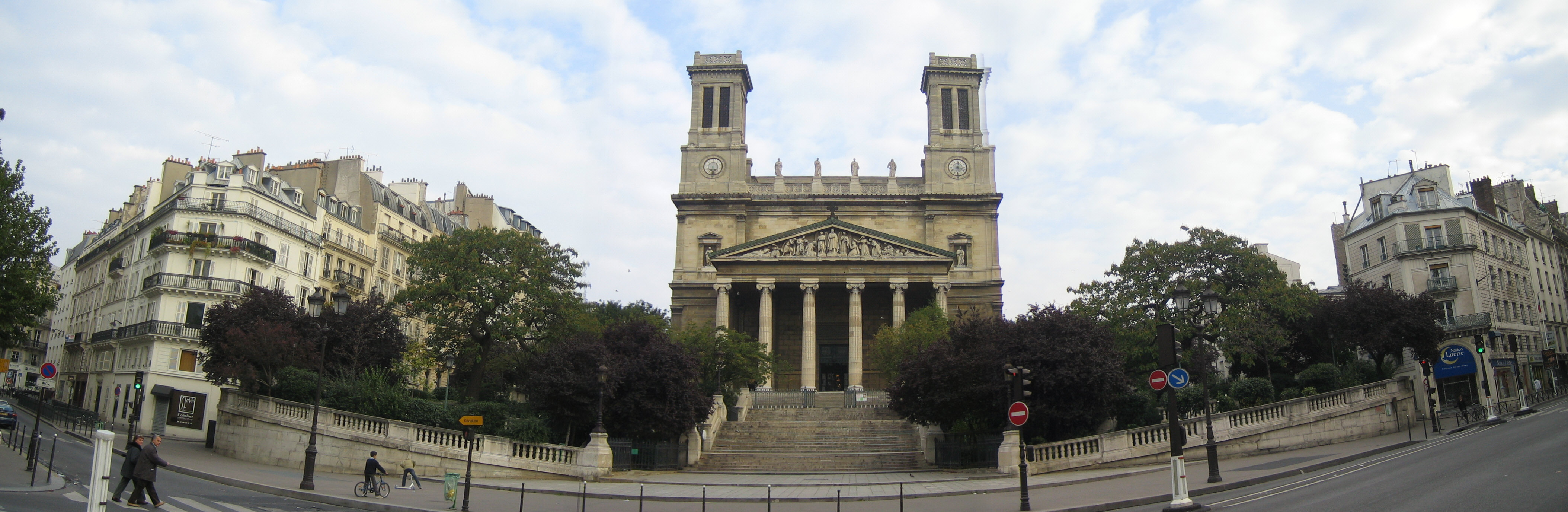 Paris, église Saint-Vincent-de-Paul